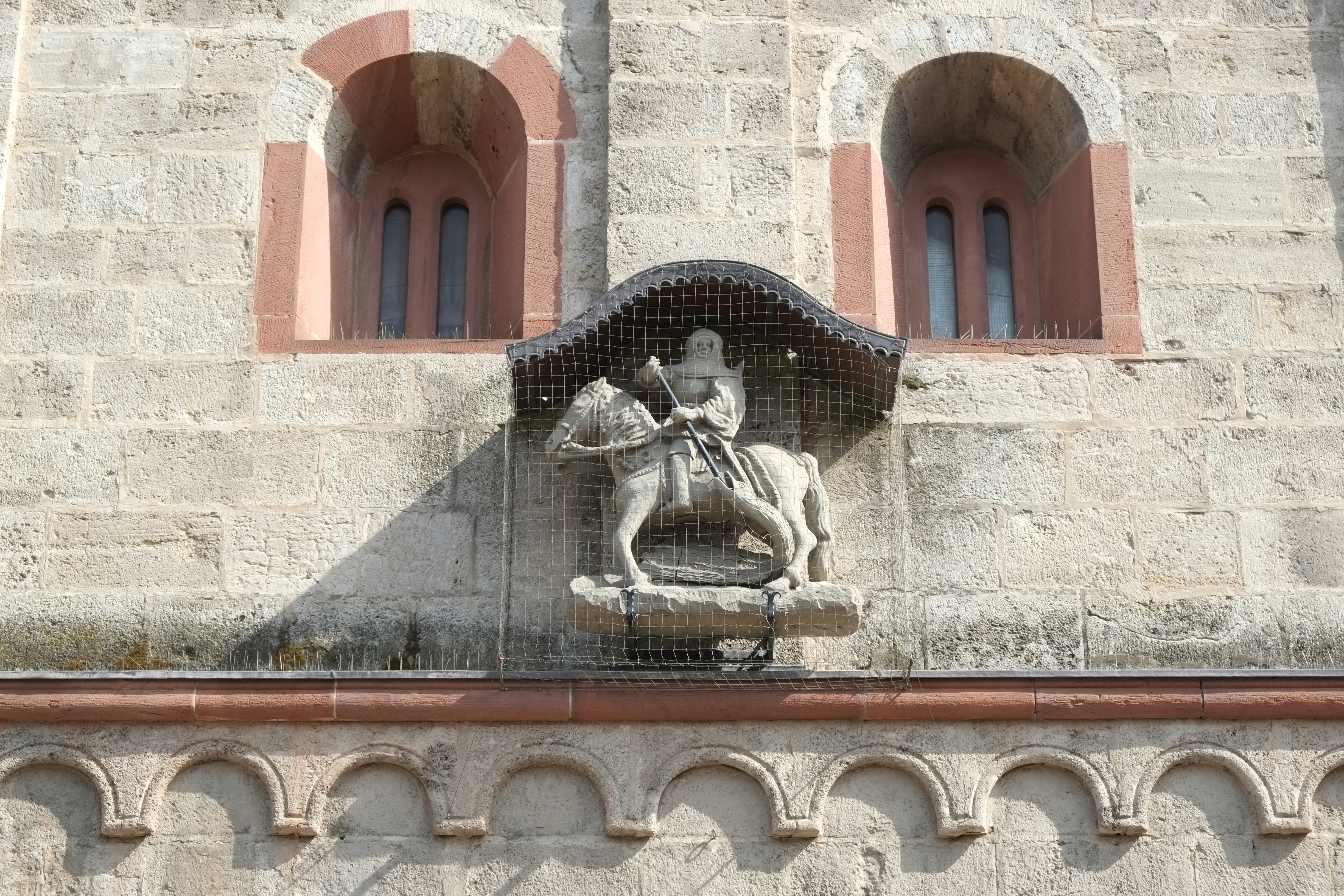 Skulptur des hl. Georg (15. Jahrhundert) an der katholischen Pfarrkirche St. Andreas in Karlstadt im Main-Spessart-Kreis (Bayern, Deutschland)